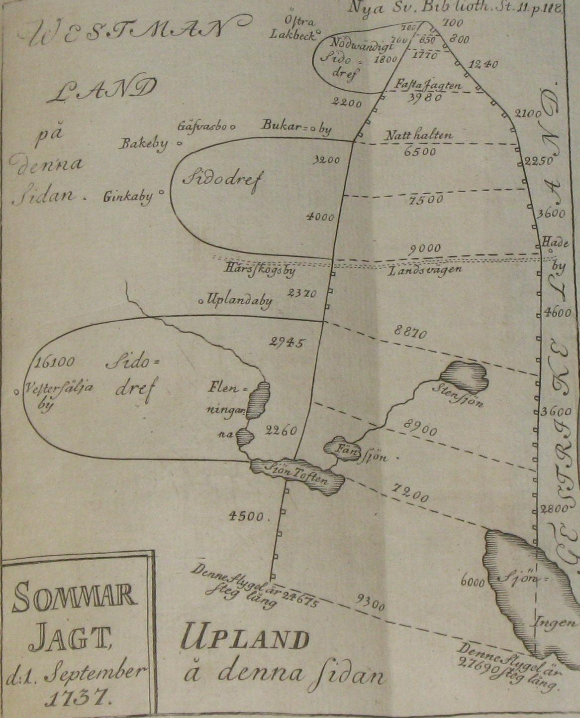 Jaktplan över skalljakt, hållen för Fredrik I i Östervåla 1737, av hovjägmästare Anders Schönberg enligt den av honom utarbetade skalljaktsmetoden.